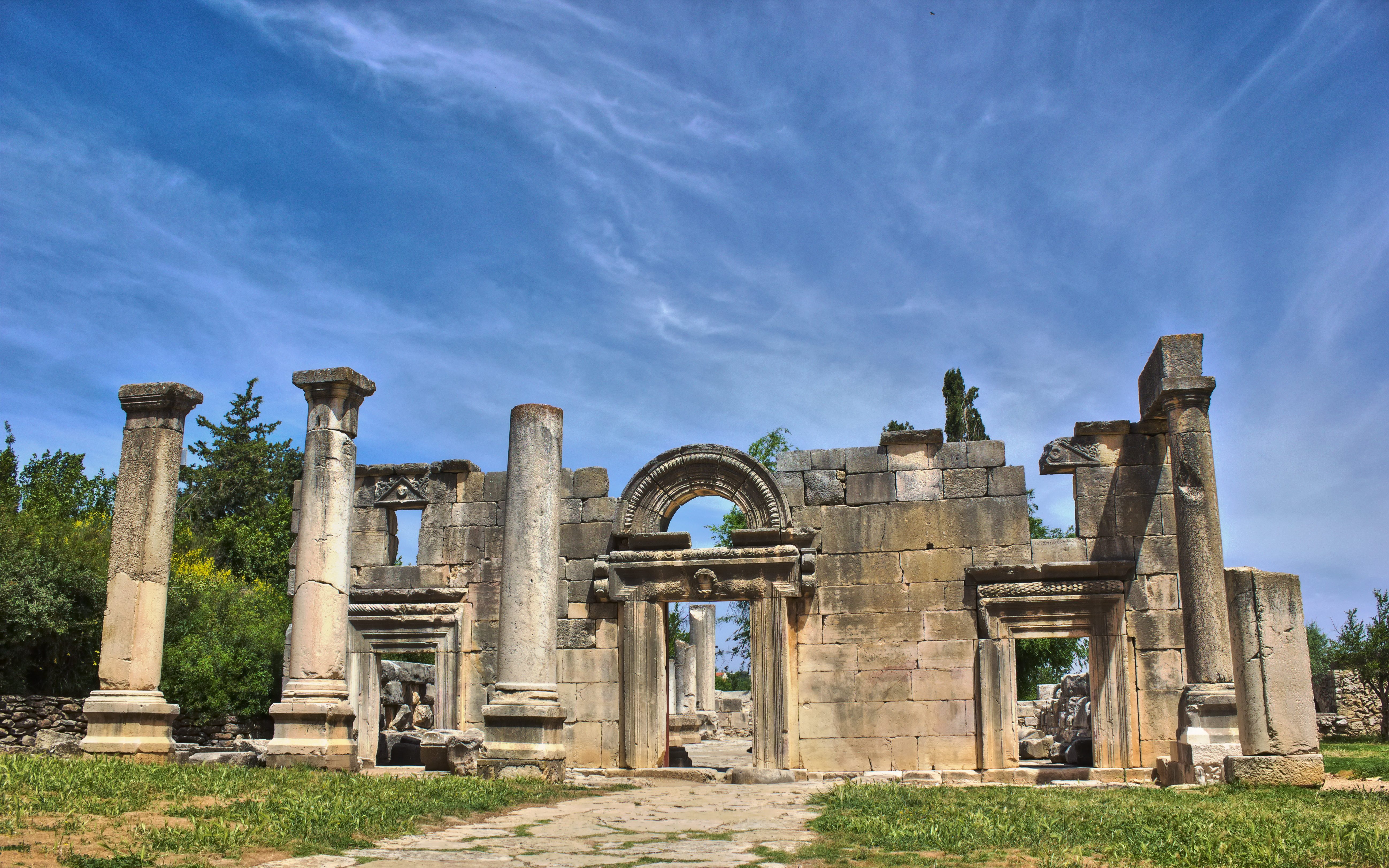 Baram ancient synagogue